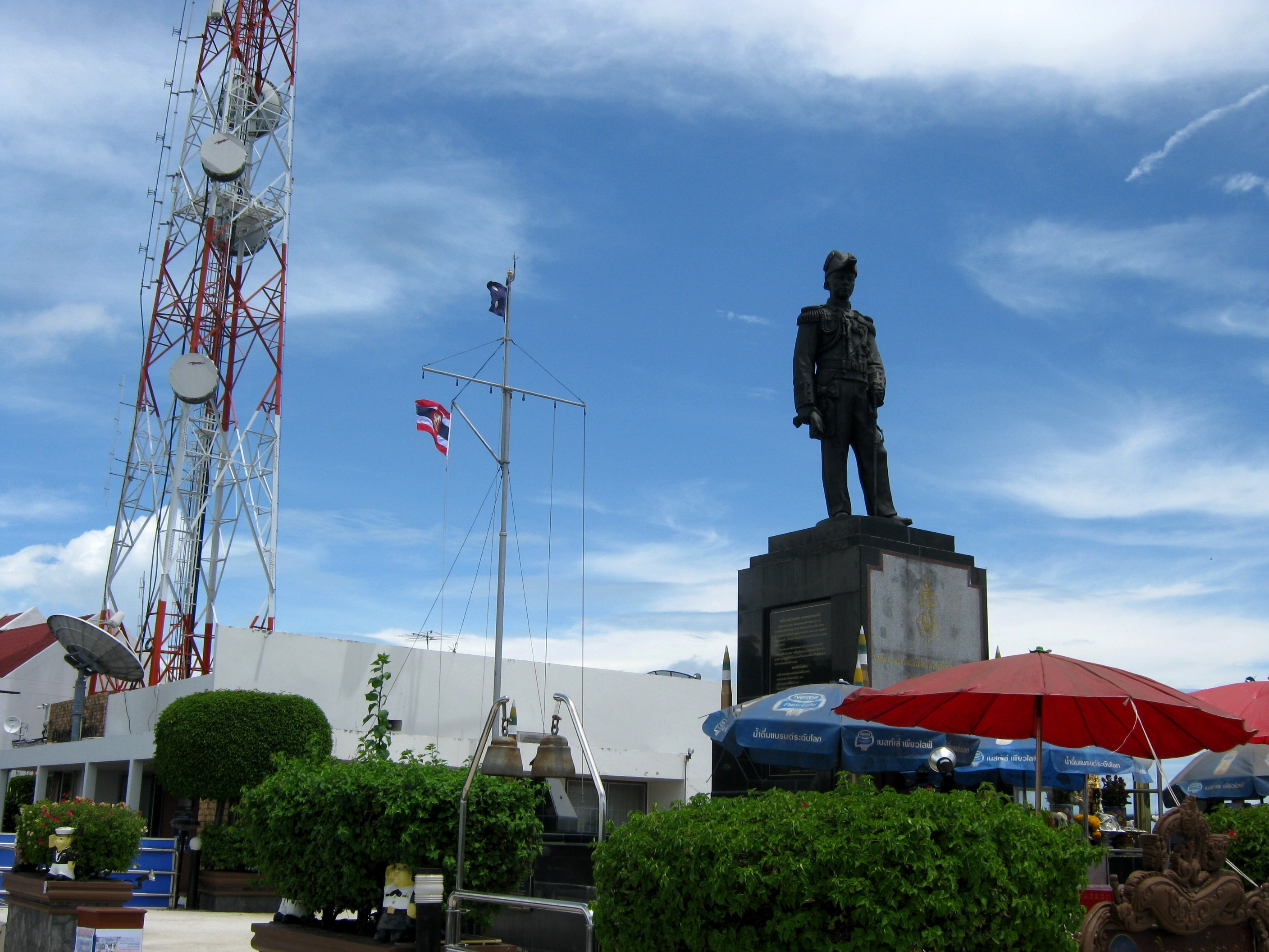 Памятник адмиралу Кяртивонгу (Паттайя)